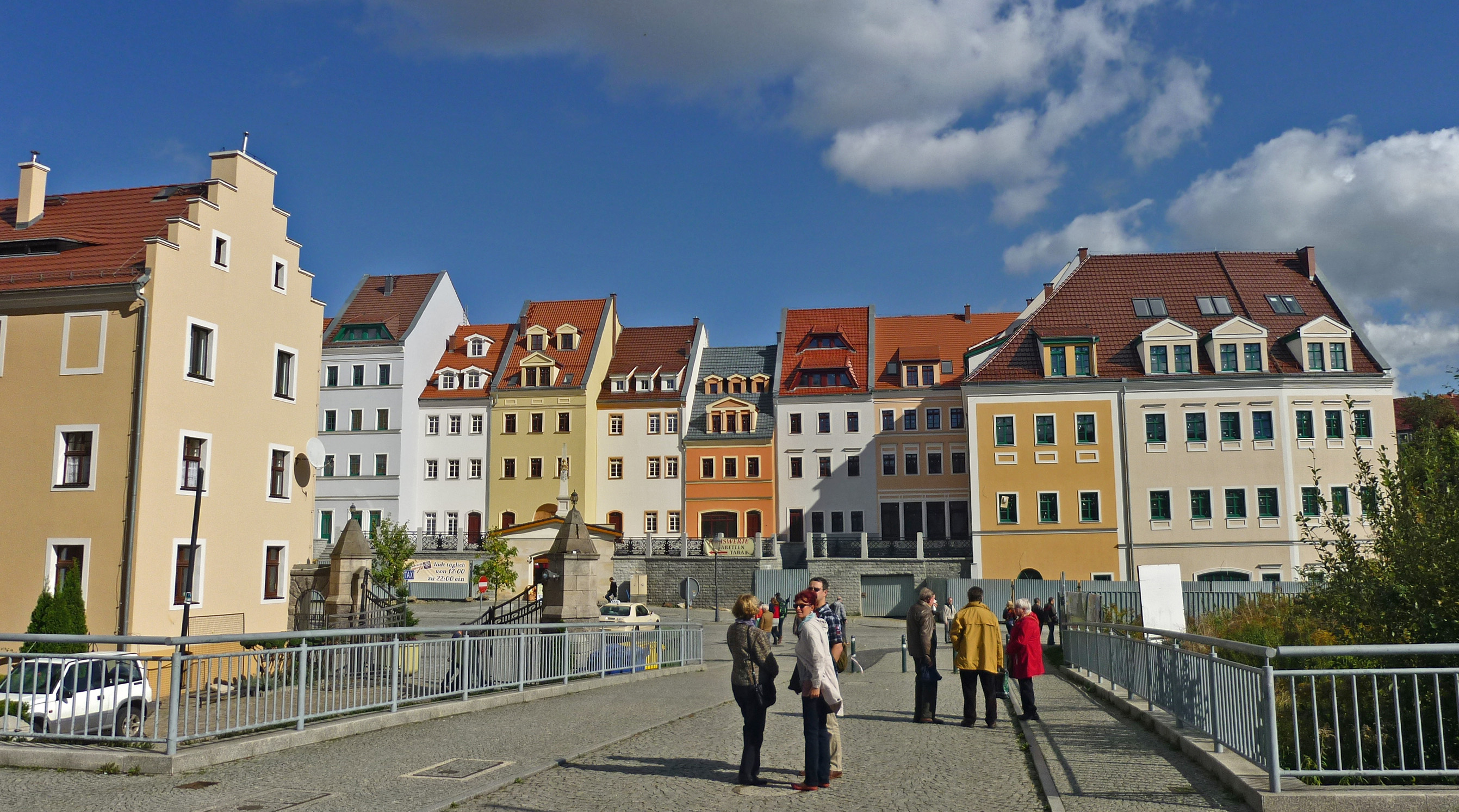 Görlitz-Zgorzelec, Blick von der Altstadtbrücke (Grenzbrücke) auf die Neubauten im alten Baustil in der ul. Wroclawska in Zgorzelec